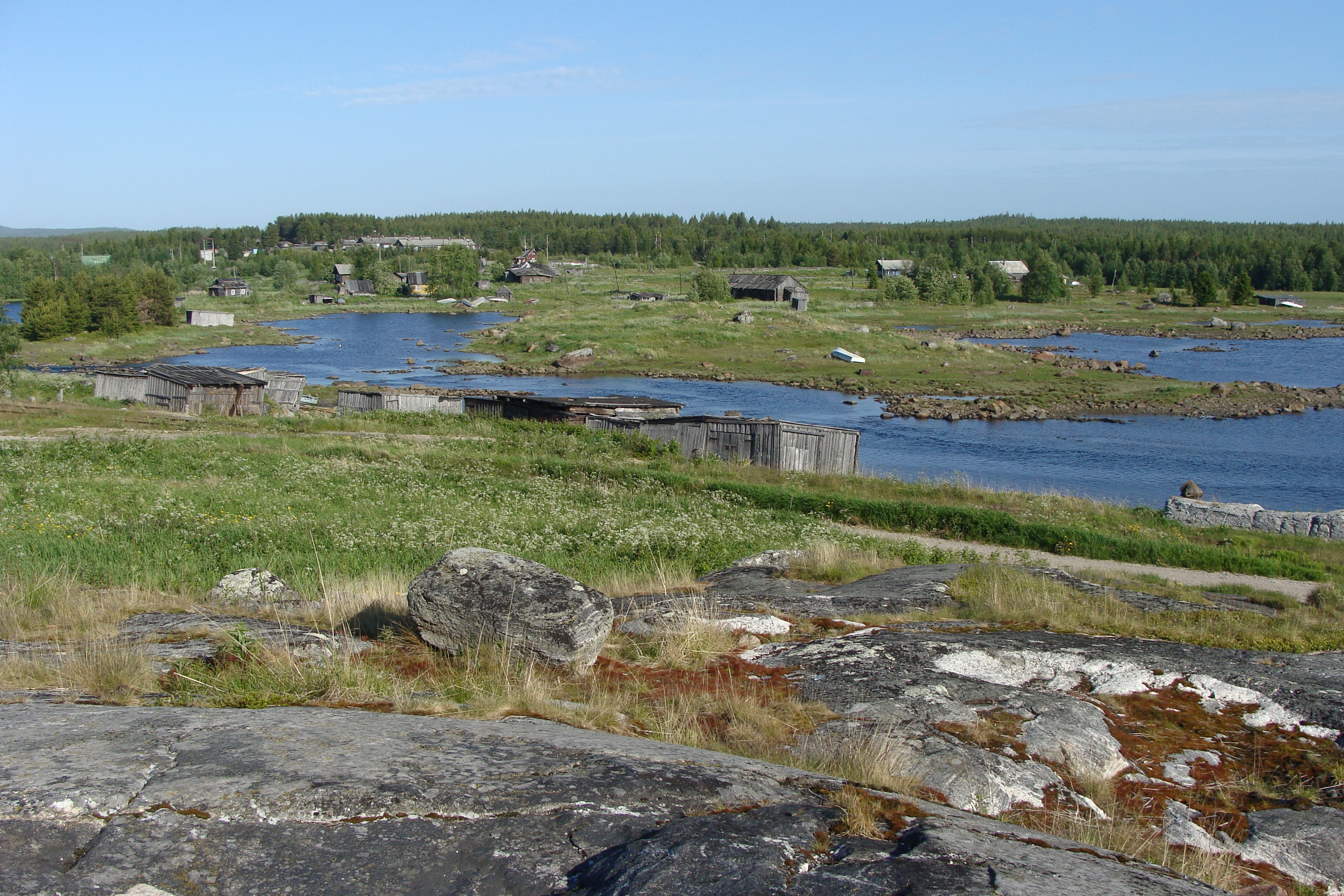 Пояконда (вид от геопункта)